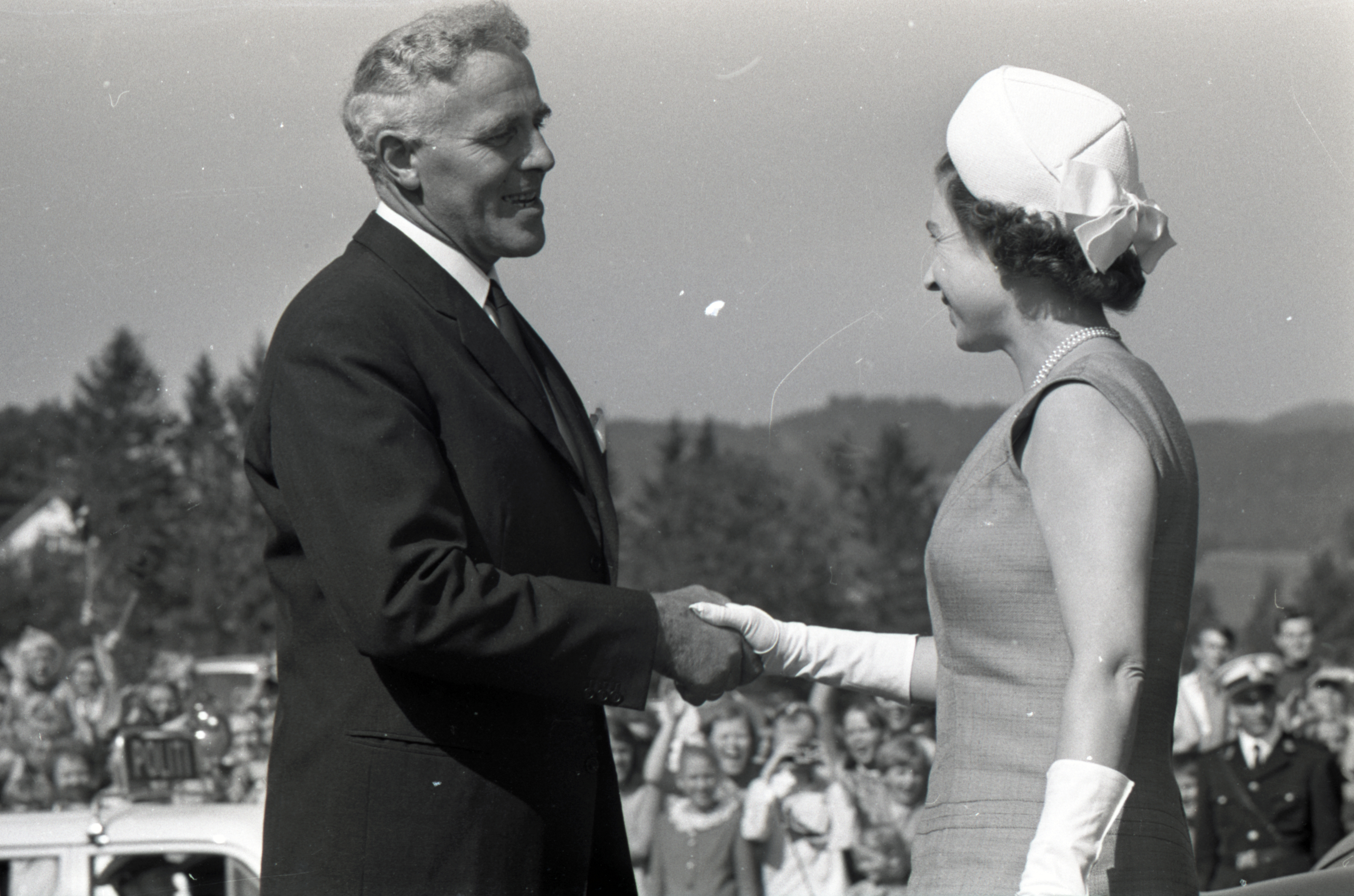 Bildet er hentet fra Arkivverket. Mandag 11. august 1969 kunne statsminister Per Borten ønske Storbritannias dronning Elisabeth II velkommen til gards hjemme i Flå i Sør-Trøndelag. Arkivinstitusjon : Riksarkivet Arkivnavn : Billedbladet NÅ Sted : NORGE, Oslo, Oslo, Emneord: Norske regjeringer, Norske statsministre, Politikk, Senterpartiet, Dronning Elisabeth II Avbildet